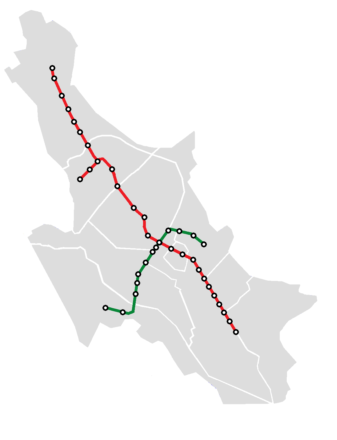 نقشه جغرافیایی خطوط قطار شهری شیراز و مناطق شهرداری شهر